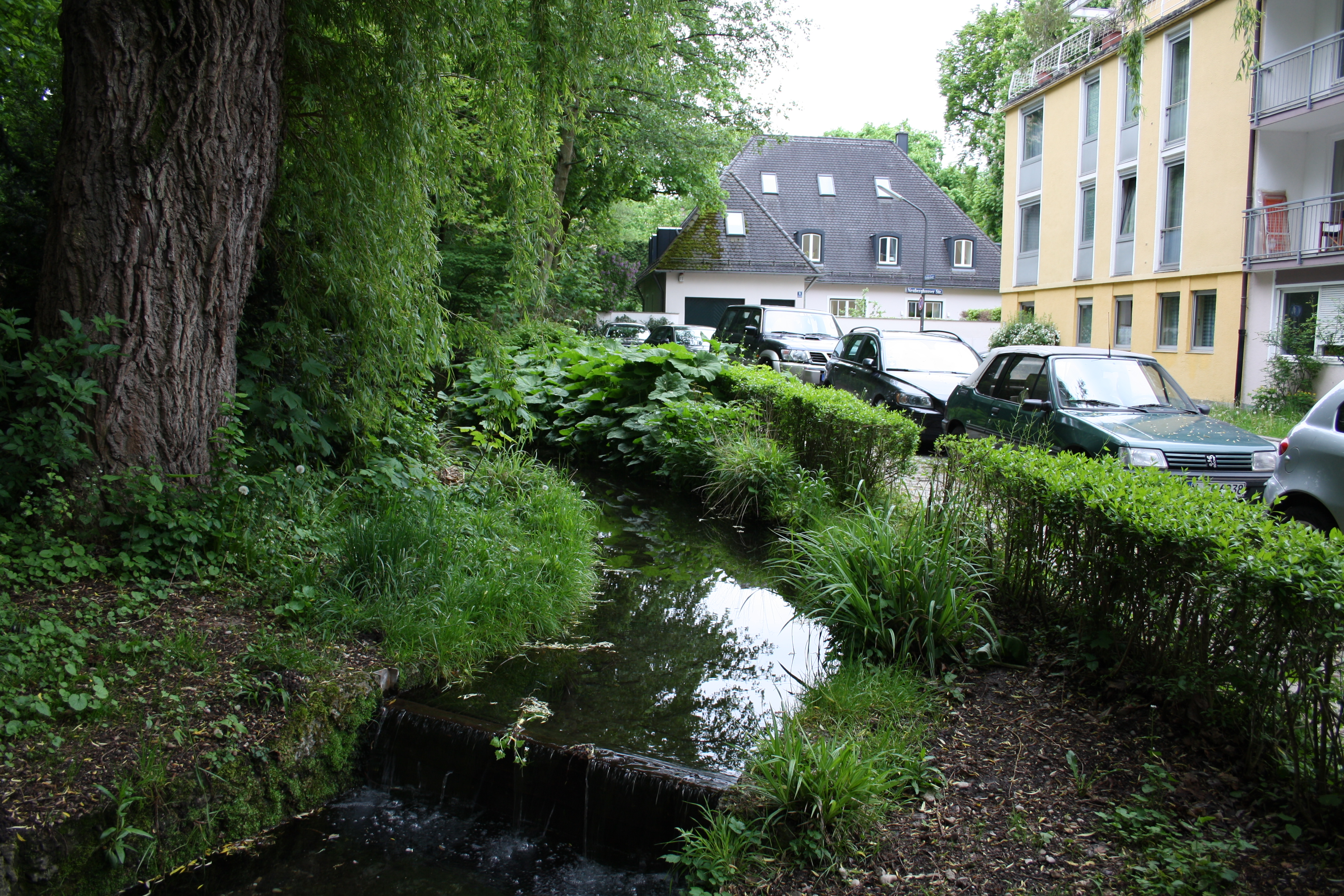 Brunnthaler Quellbach